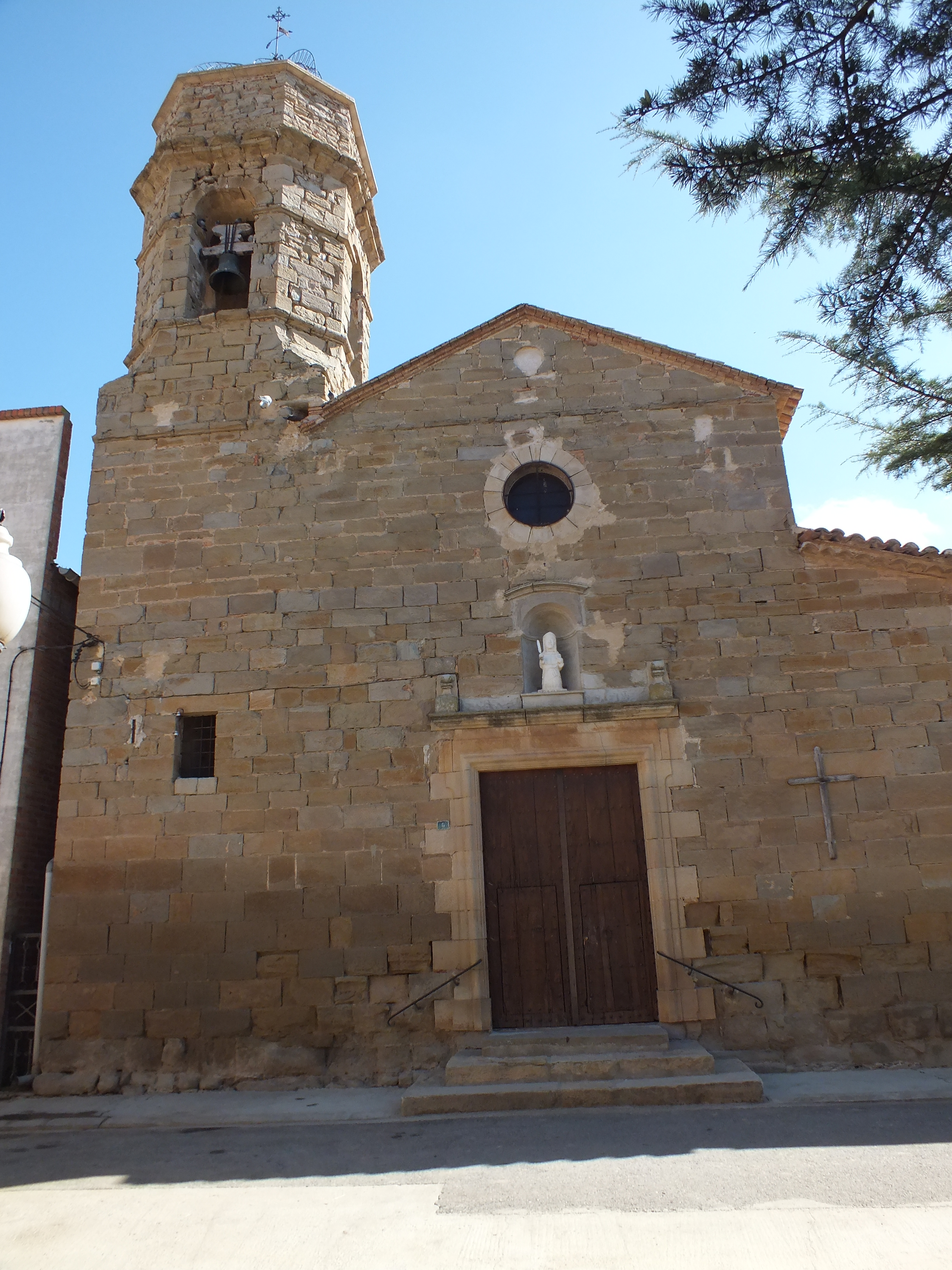 Església parroquial de Santa Cecília (Tornabous)